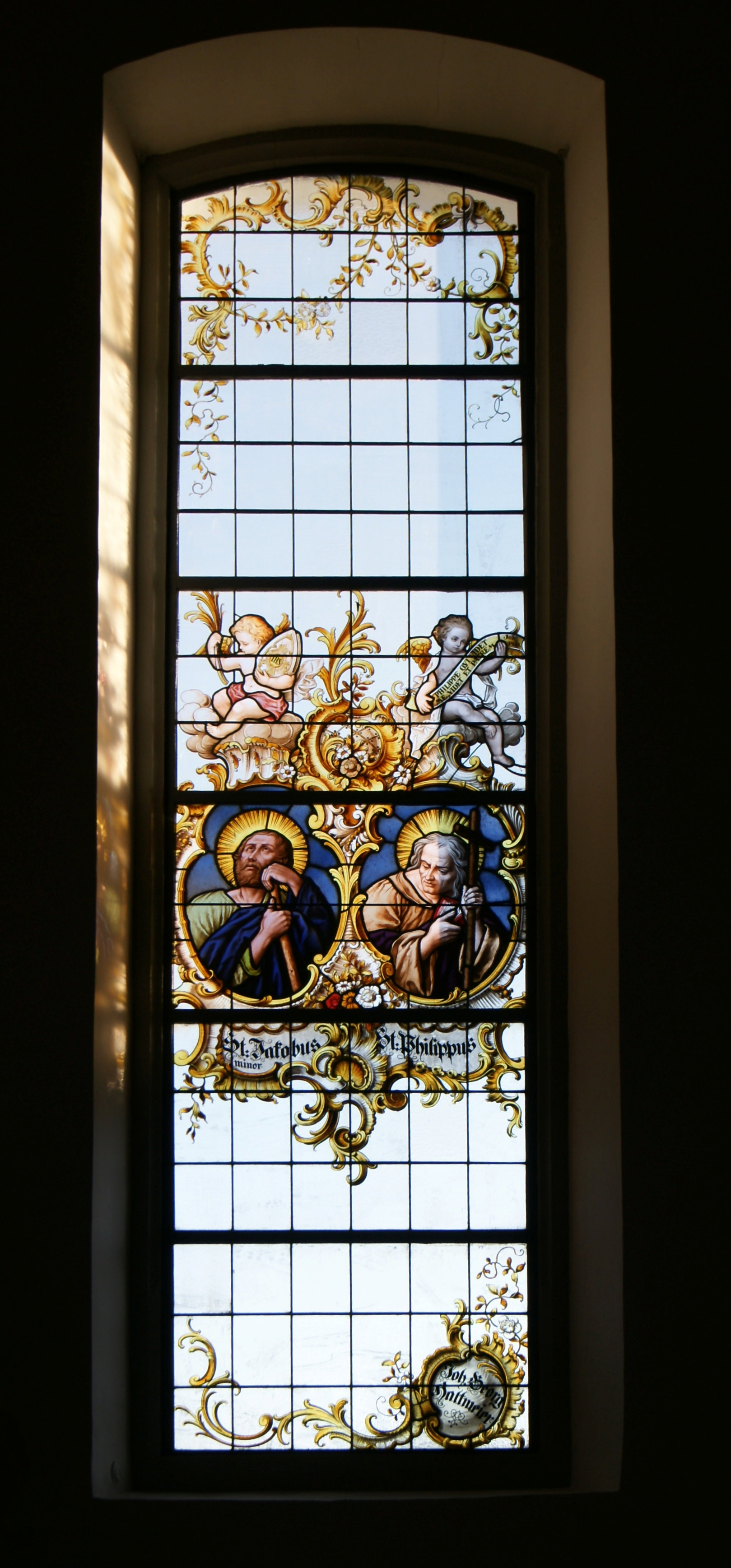 Pfarrkirche hl. Martin in Hörbranz. Kreuzwegstationen in der Apsis von Hubert Fessler 1954; Glasmalereien von der K. Bayerischen Hofglasmalerei F.X. Zettler, München 1895.